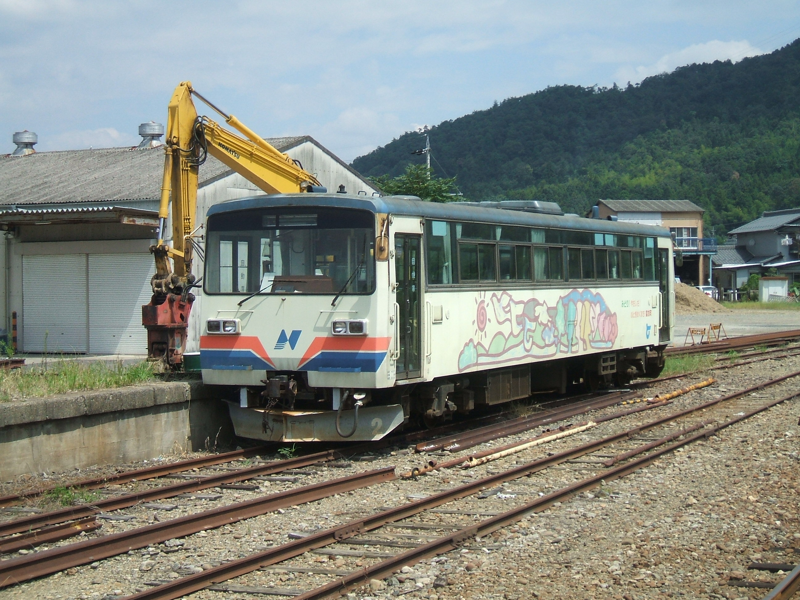 美濃市駅側線に留置されている1形2号車